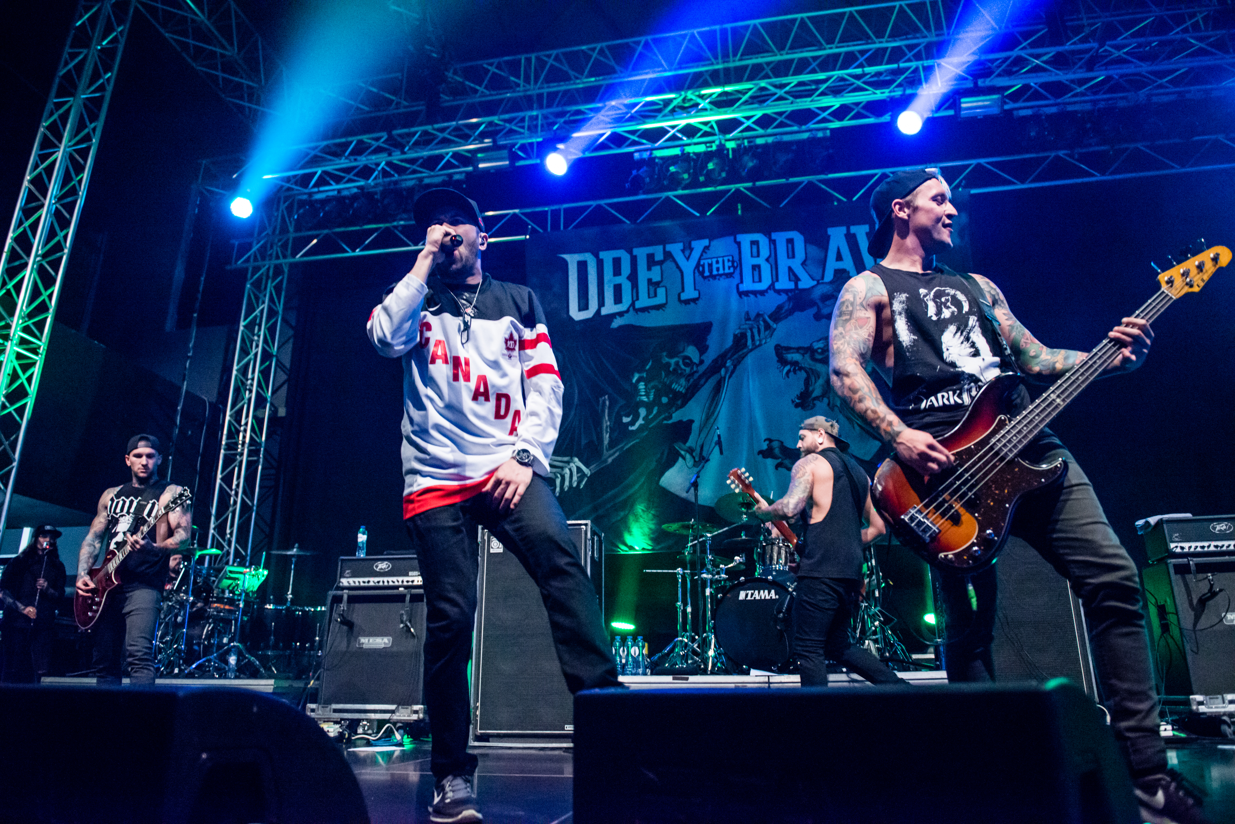 'Impericon Festival 2015; Oberhausen Turbinenhalle': 'Obey the Brave'